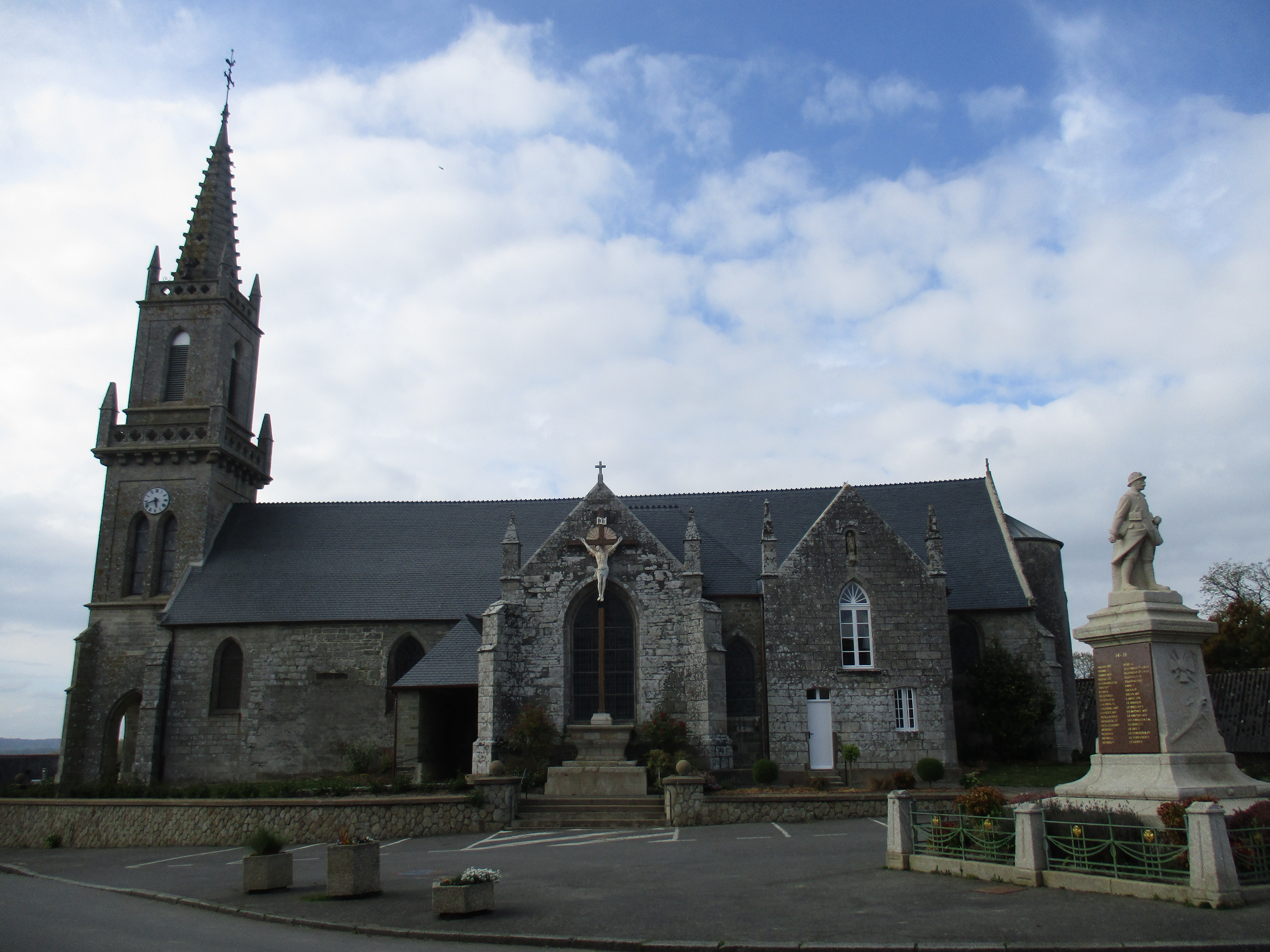 L'église Saint-Pierre et Saint-Paul de Kergrist (56) This building is indexed in the Base Mérimée, a database of architectural heritage maintained by the French Ministry of Culture, under the references IA00009860 and IA00009861 .